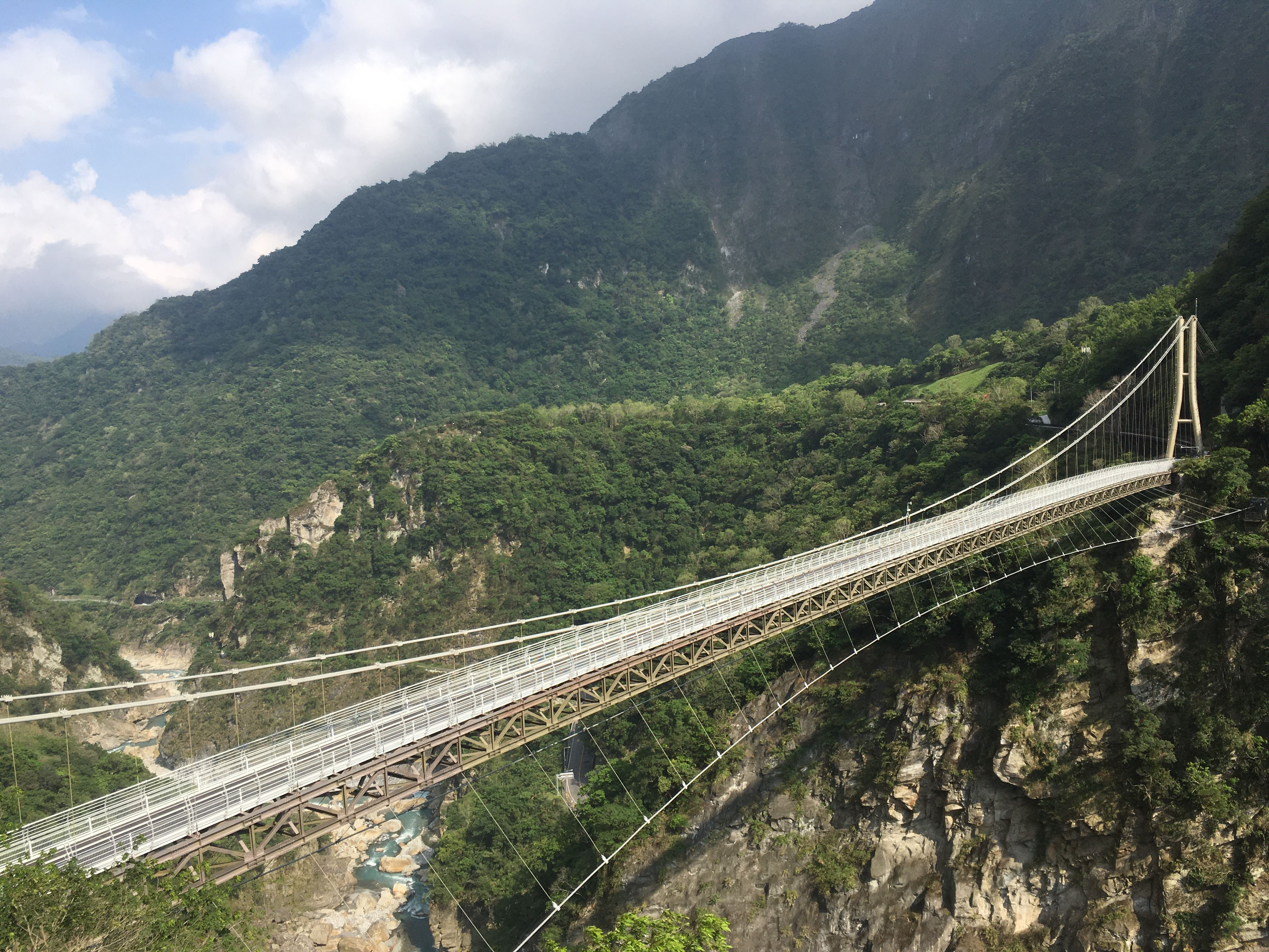 中文（台灣）: 2019年建成的新一代山月吊橋，由北側望向南側橋塔與布洛灣臺地